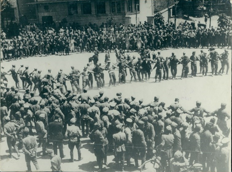 Фронтовашко хоро на площада в Крумовград по случай завръщането от фронта на 44-ти пехотен Тунджански полк.